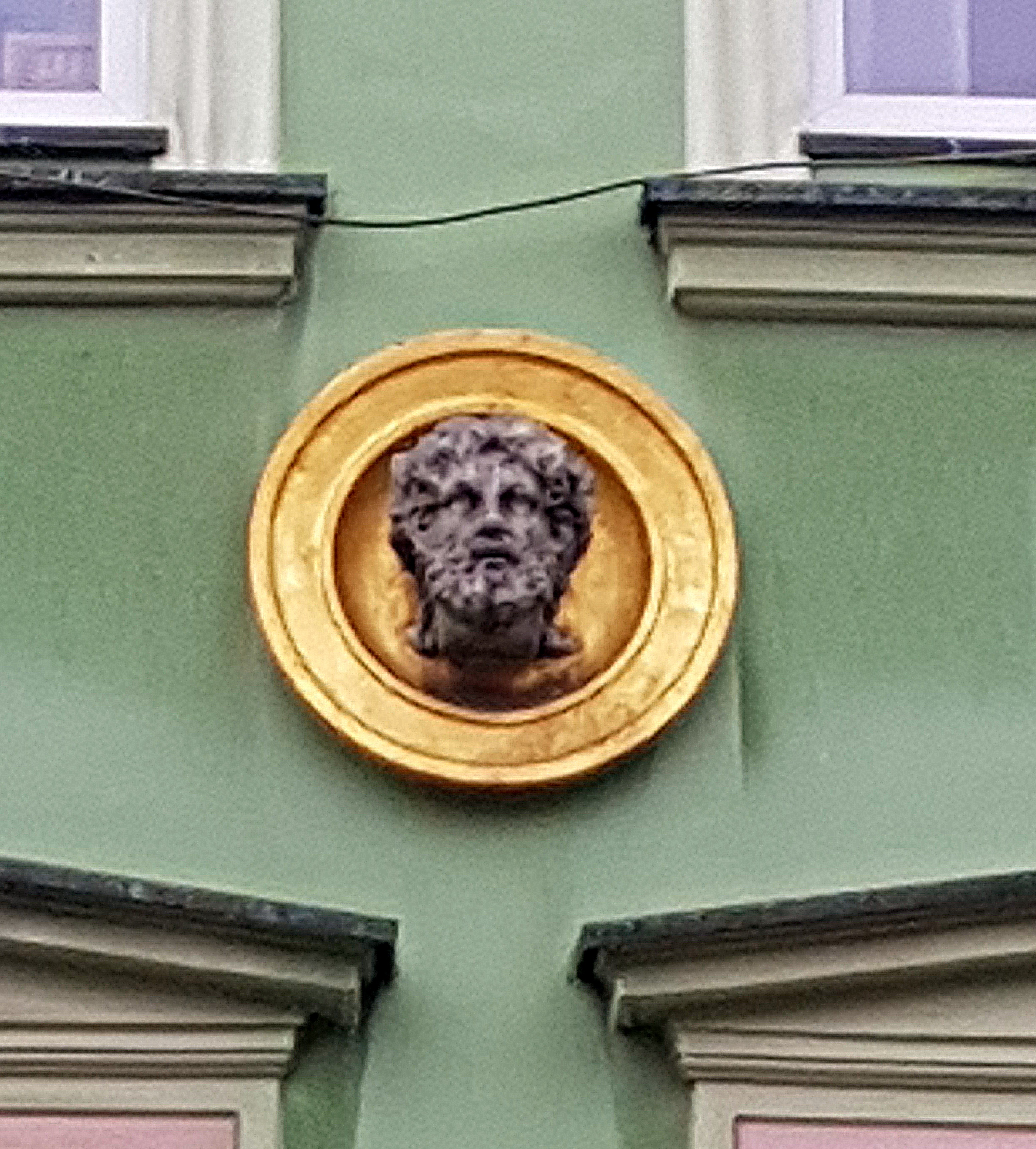 Wyobrażenie głowy św. Jana na kamienicy Rynek-Ratusz 20-21 we Wrocławiu